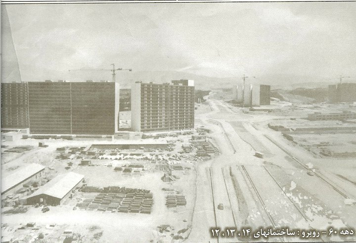 شهرک امید ، تهران ، قبل از احداث کامل دهه 1360